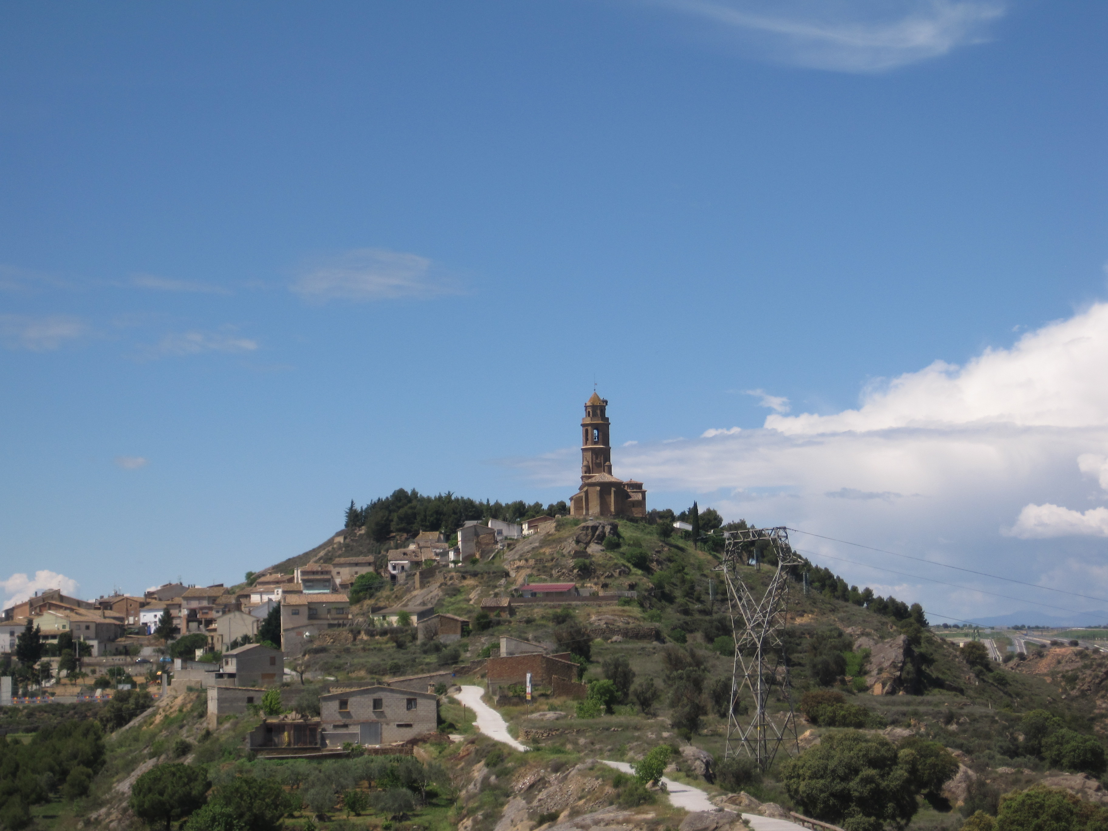 Aragonés: Castillón d'o Puent, Semontano de Balbastro, Aragón.